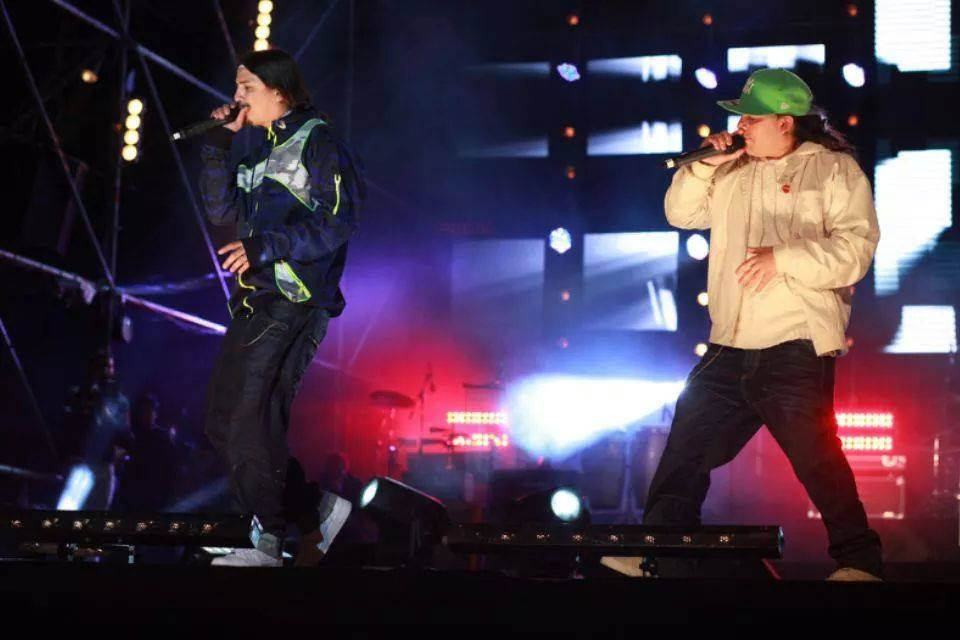 BROWEN EN TELETON 2012